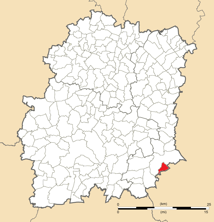 Carte de position d'Oncy-sur-École en Essonne (91)